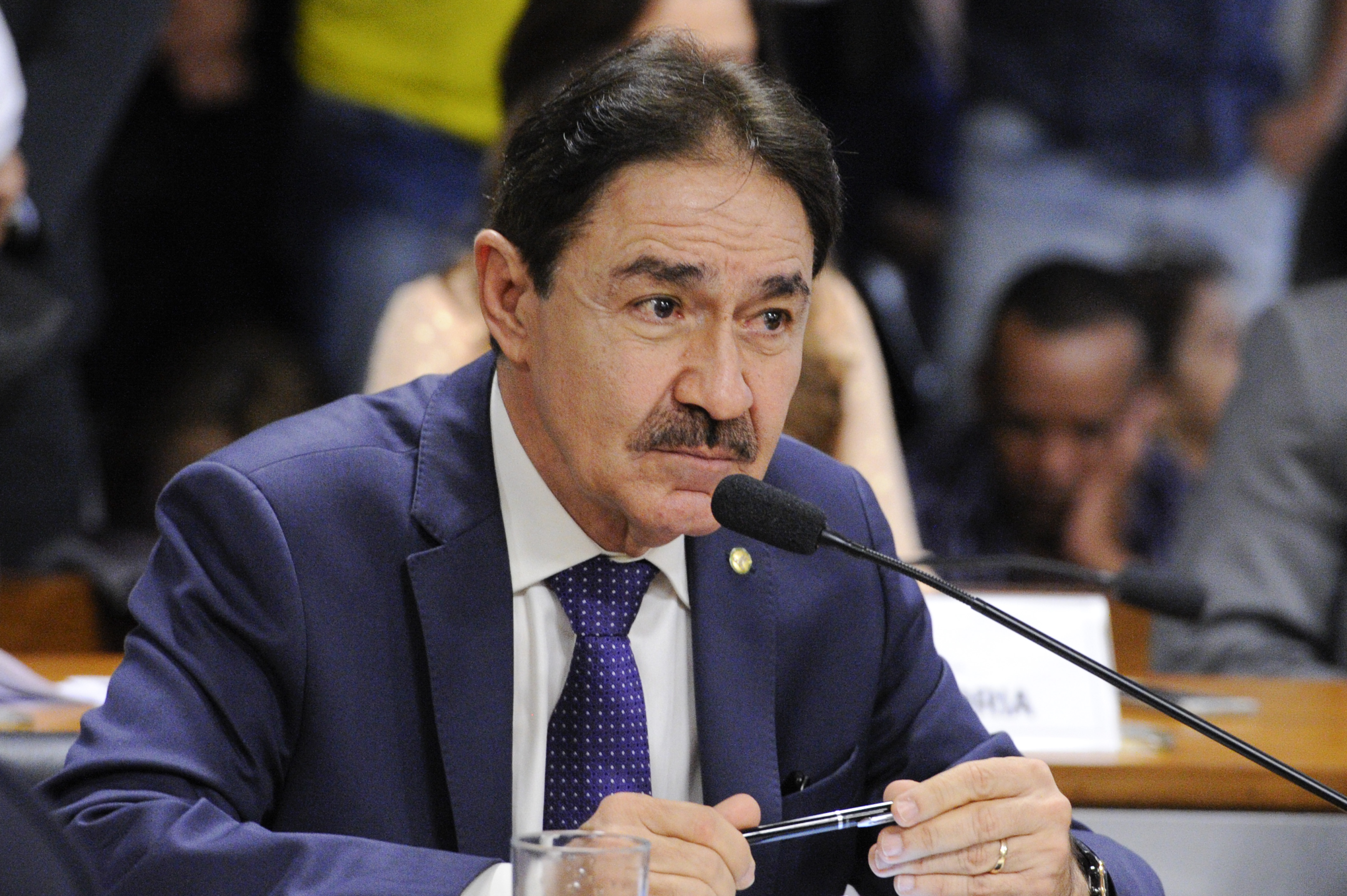 Comissão de Assuntos Sociais (CAS) realiza reunião deliberativa com 5 itens. Entre eles, o PLC 121/2015, que regulamenta a profissão de protesista/ortesista ortopédico, e o PLS 55/2011, que dispõe sobre o exercício da profissão de agente de Turismo. Em pronunciamento, deputado federal Raimundo Gomes de Matos (PSDB-CE). Foto: Edilson Rodrigues/Agência Senado